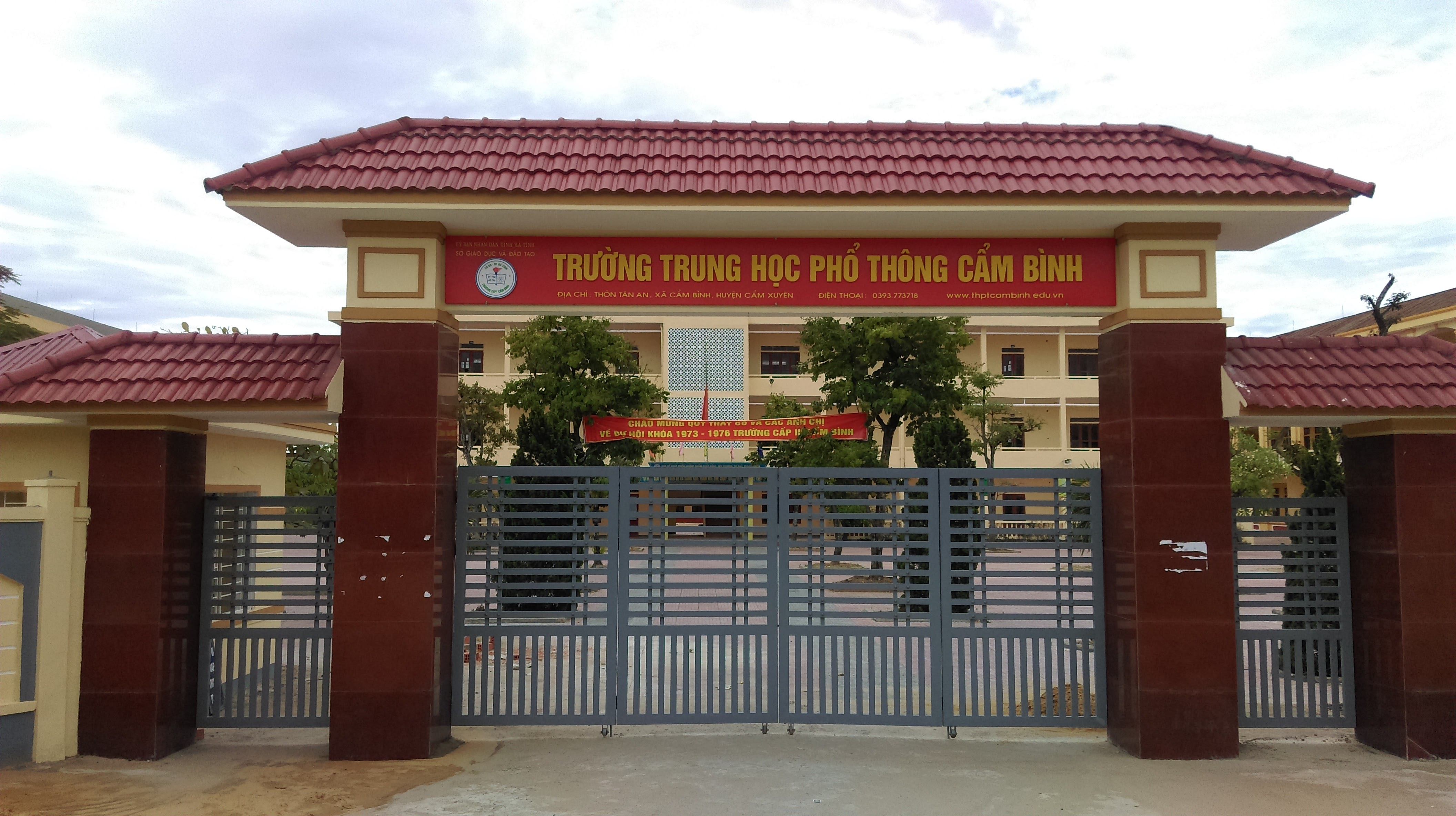 Trường THPT Cẩm Bình, Cẩm Xuyên, Hà Tĩnh